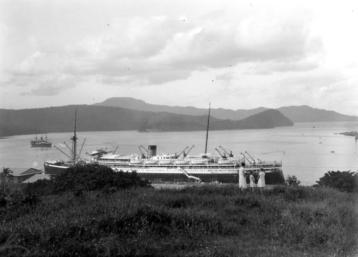 Repronegatief. De 'P.C. Hooft' in de haven van Sabang op het eiland We, ten noorden van Sumatra